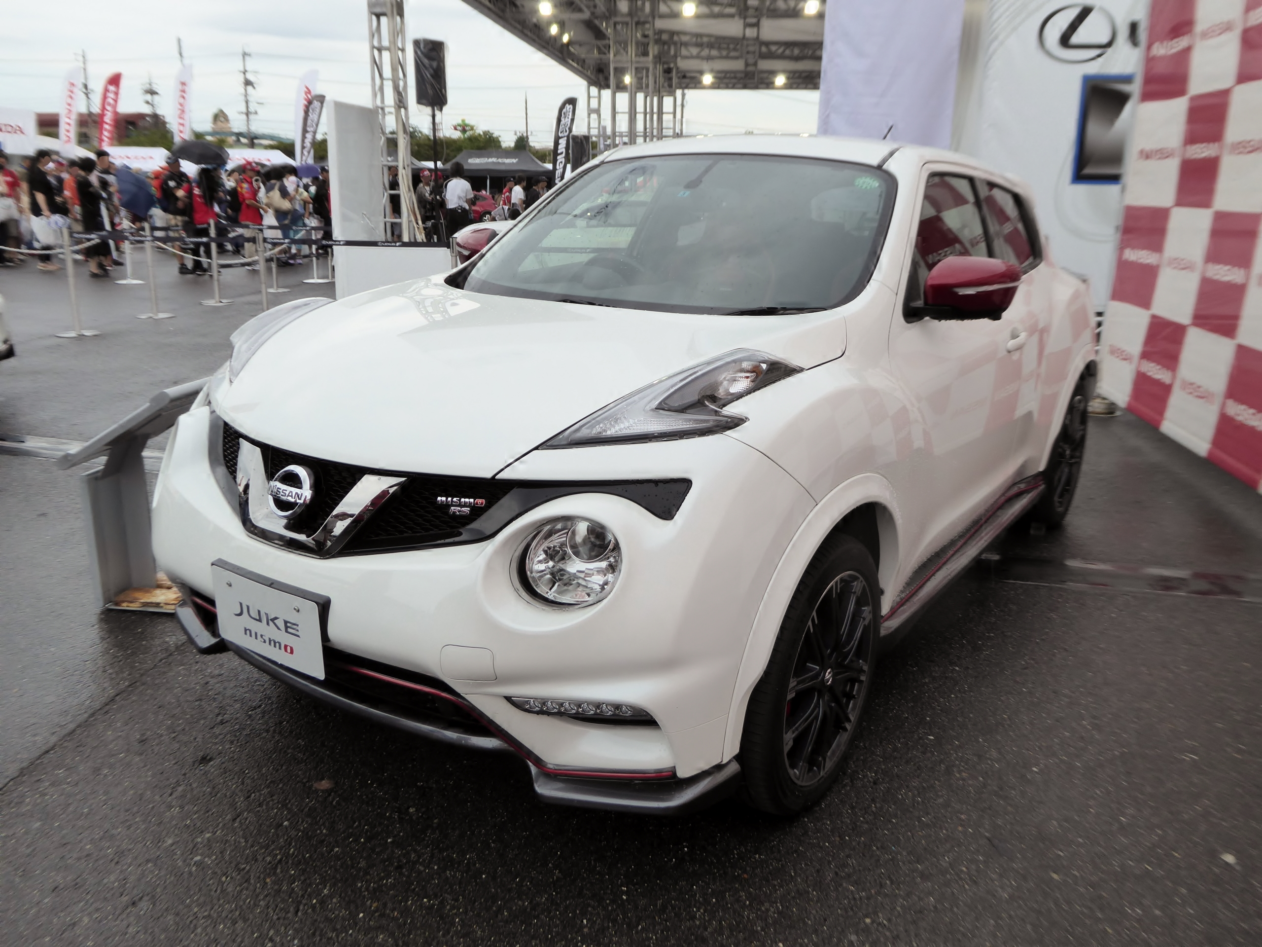 CBA-NF15型日産・ジュークニスモRSをフロントから撮影。